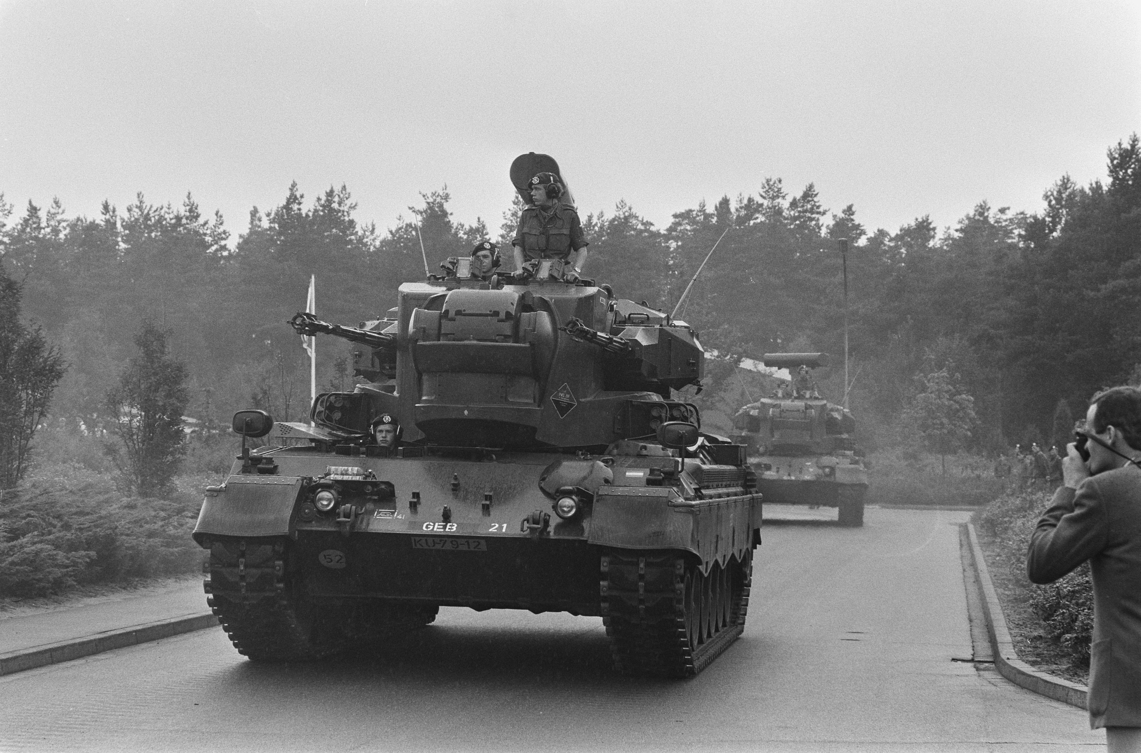 Collectie / Archief : Fotocollectie Anefo Reportage / Serie : [ onbekend ] Beschrijving : Bezoek Hare Majesteit de Koningin aan Nederlandse troepen in Seedorf en omstreken in BRD; Leopard tanks met luchtdoelgeschut Datum : 20 augustus 1986 Locatie : Duitsland, Seedorf Trefwoorden : TANKS, TROEPEN, bezoeken, koninginnen Instellingsnaam : Leopard Fotograaf : Croes, Rob C. / Anefo Auteursrechthebbende : Nationaal Archief Materiaalsoort : Negatief (zwart/wit) Nummer archiefinventaris : bekijk toegang 2.24.01.05 Bestanddeelnummer : 933-7360